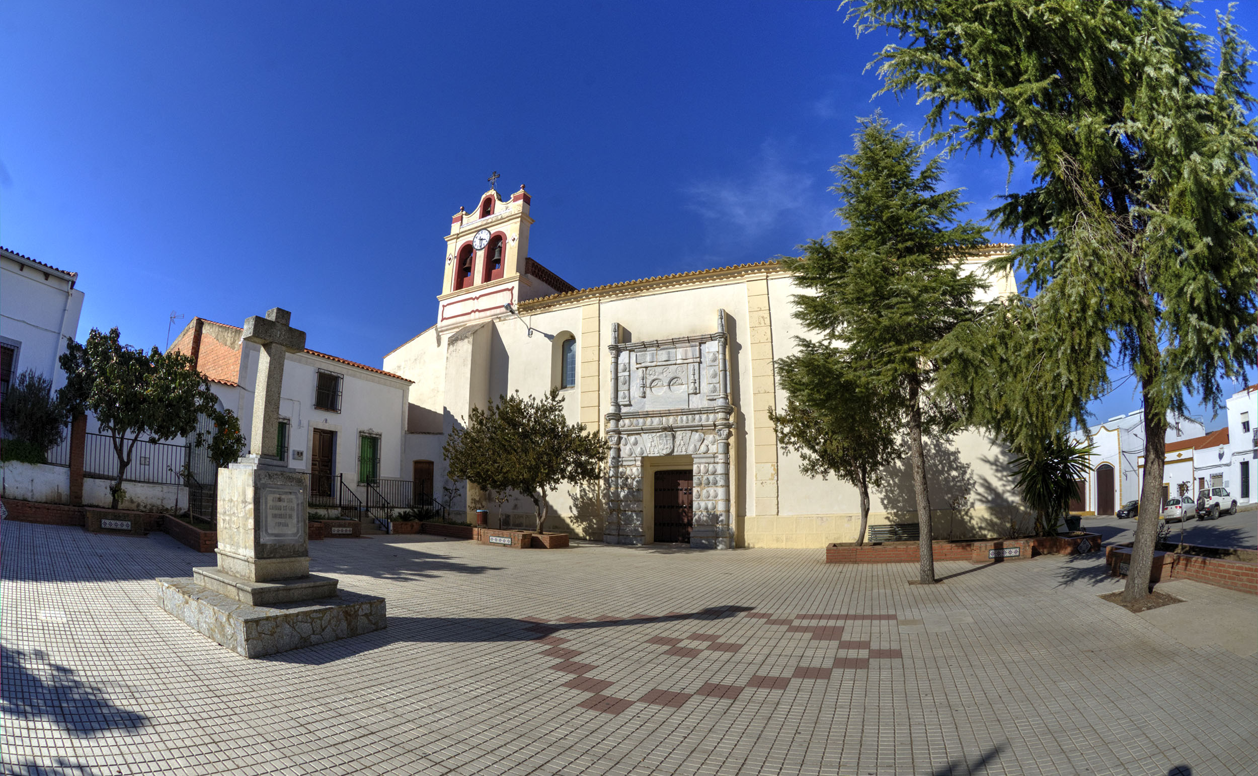 Iglesia parroquial de San Esteban en Puebla del Prior, Badajoz